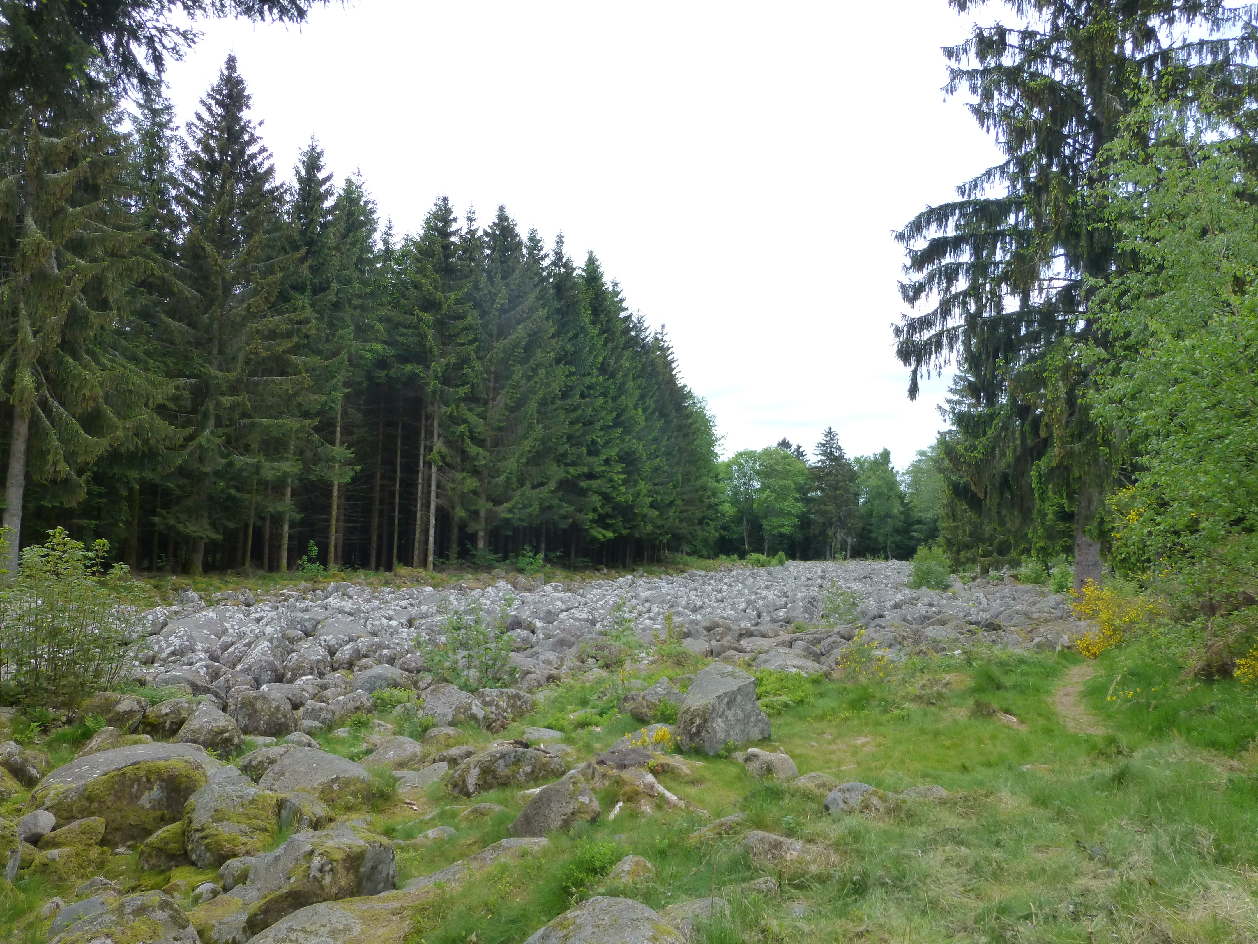 Barbey-Seroux (Vosges) : Champ de Roches